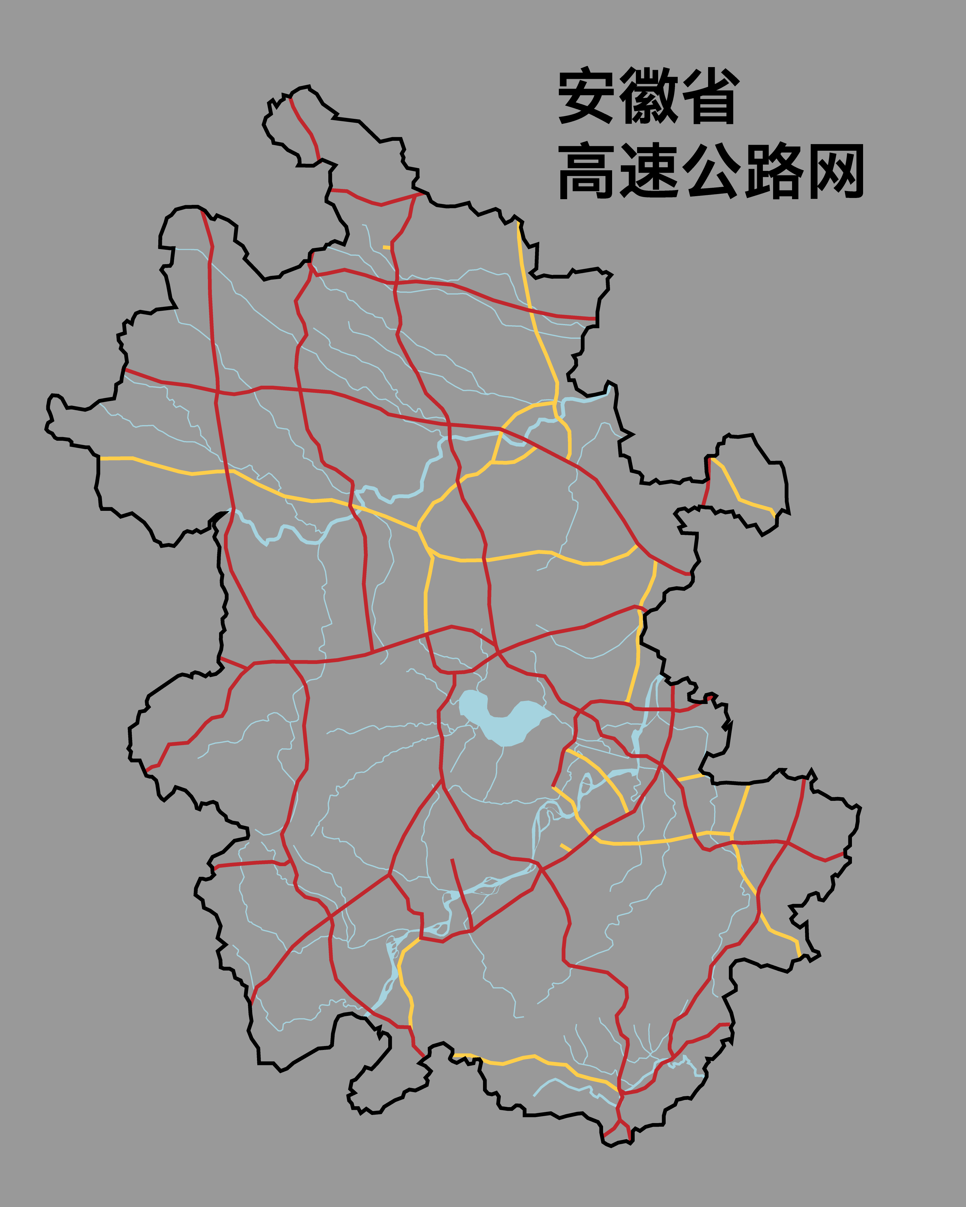 安徽省高速公路网